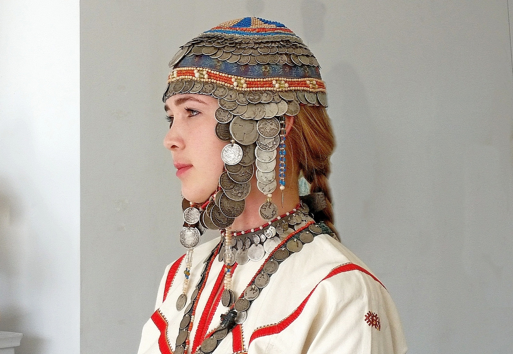 Традиционный головной убор (чув. тухъя) с полусферической основой из холста, с бисерным шитьем и серебряными монетами. Средненизовая этнографическая группа (анат енчи). Носился девушками в составе праздничного, обрядового и выходного костюма.